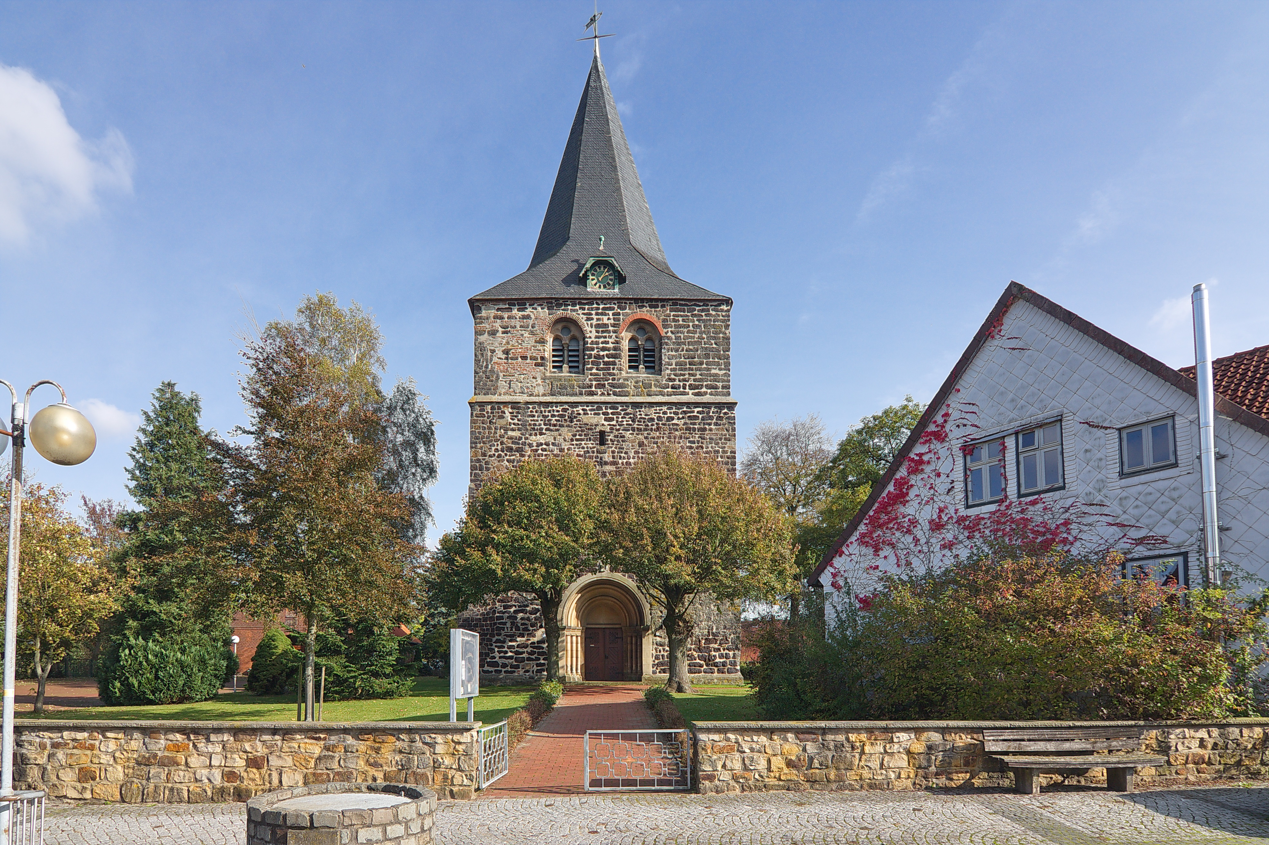 St. Osdag-Kirche in Mandelsloh (Neustadt am Rübenberge), Niedersachsen, Deutschland